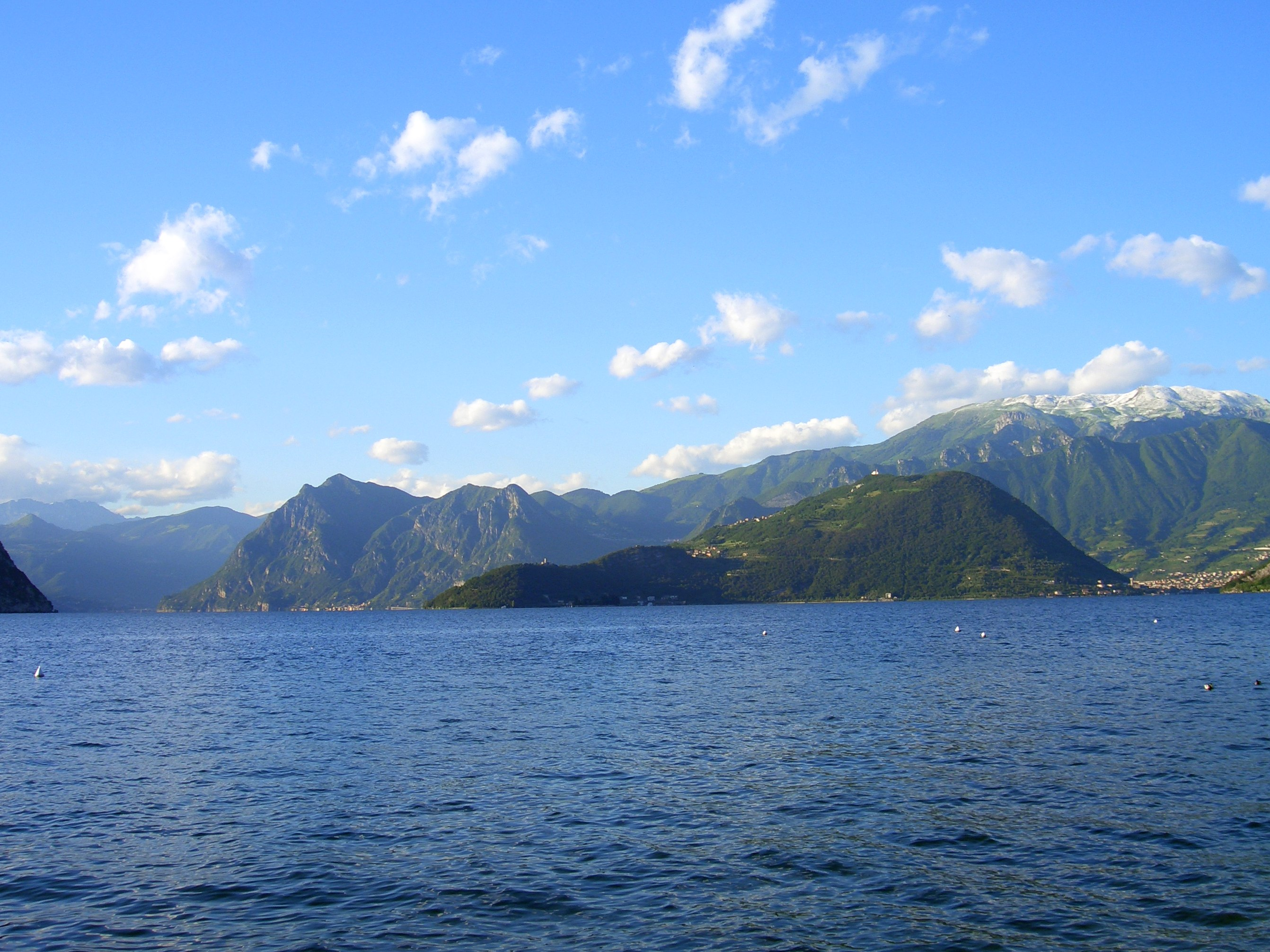 Die Monte Isola im Iseosee